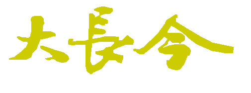 대장금 기본 로고입니다.